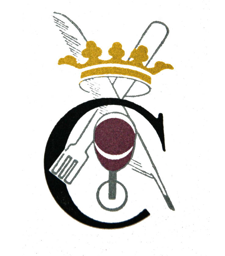 chiffre de Curnonsky extrait de La France à Table mai 1934